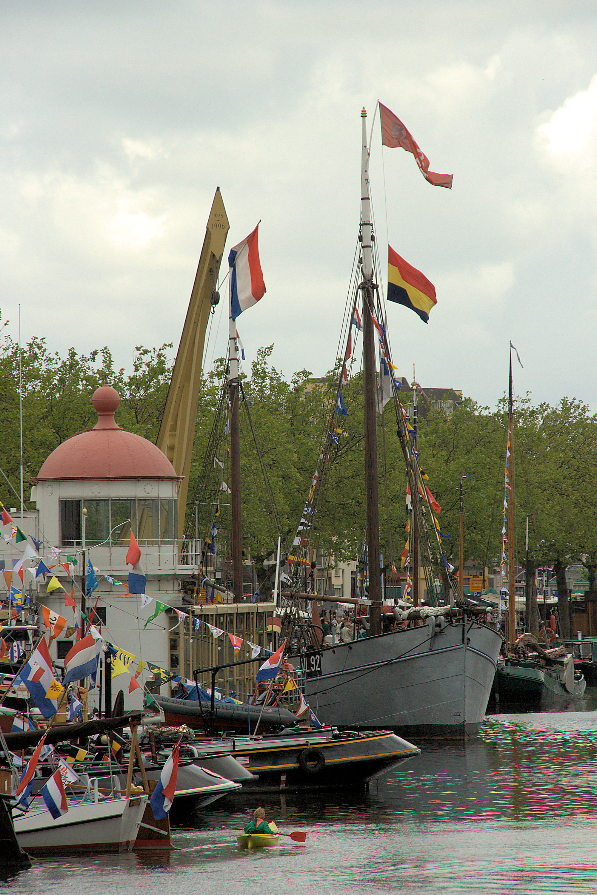 VL 92 Balder, Haringlogger. Visserijmuseum - Balder (VL92)